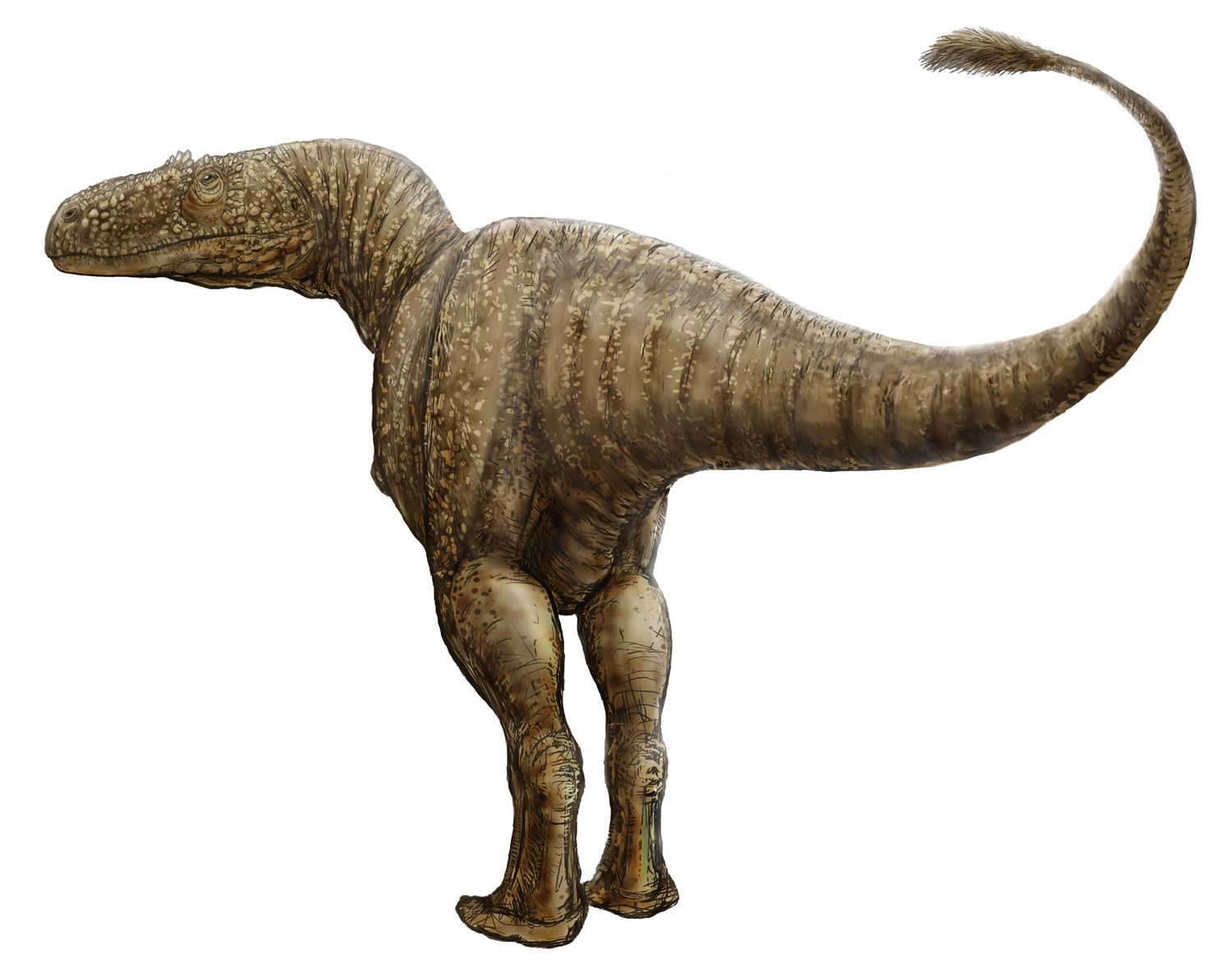 Condorraptor currumili.